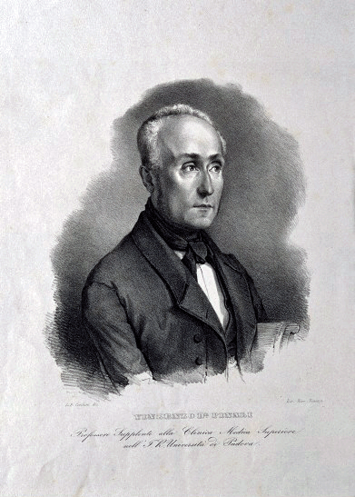 Ritratto di Vincenzo Pinali